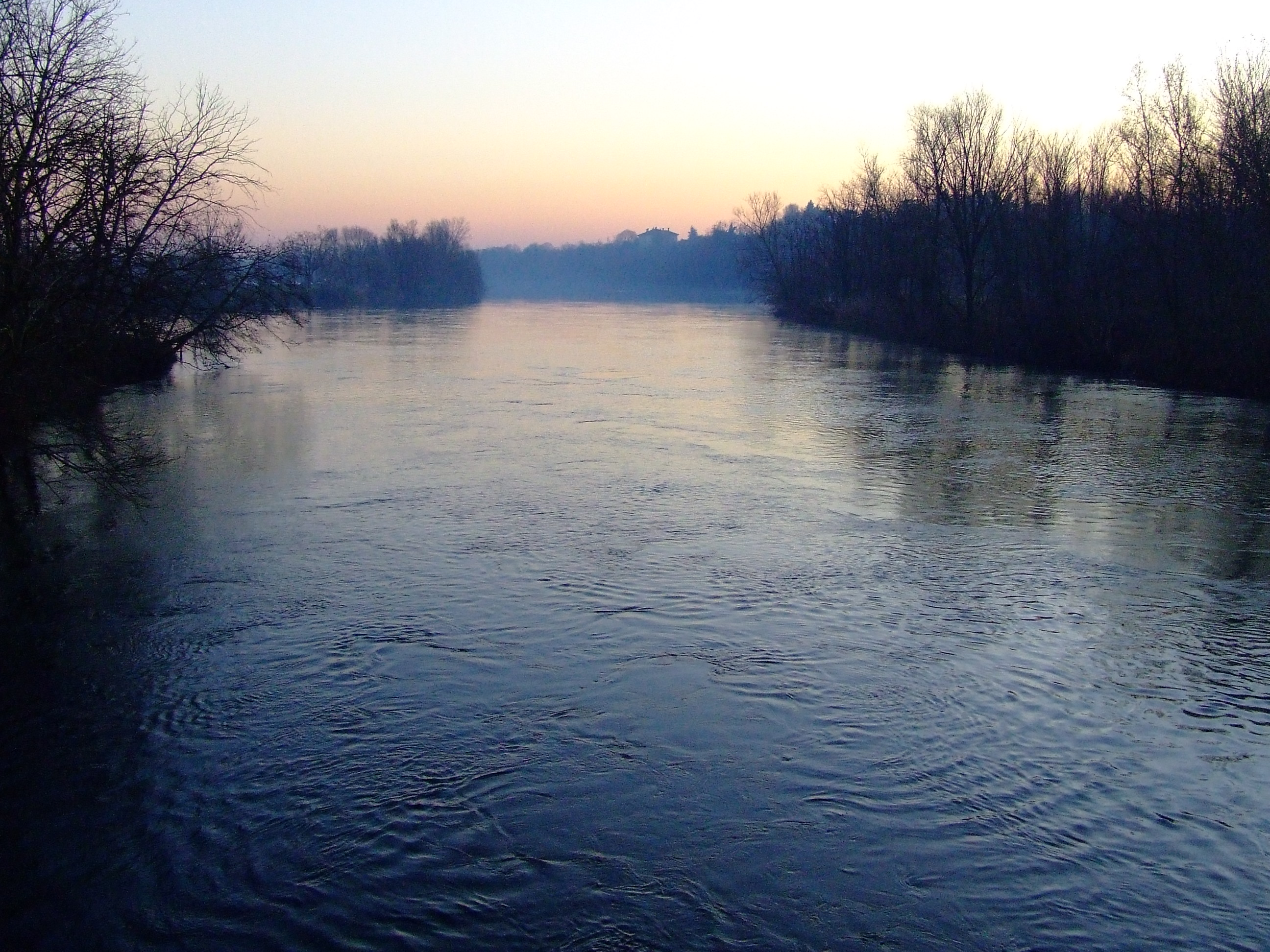 Fara Gera d'Adda